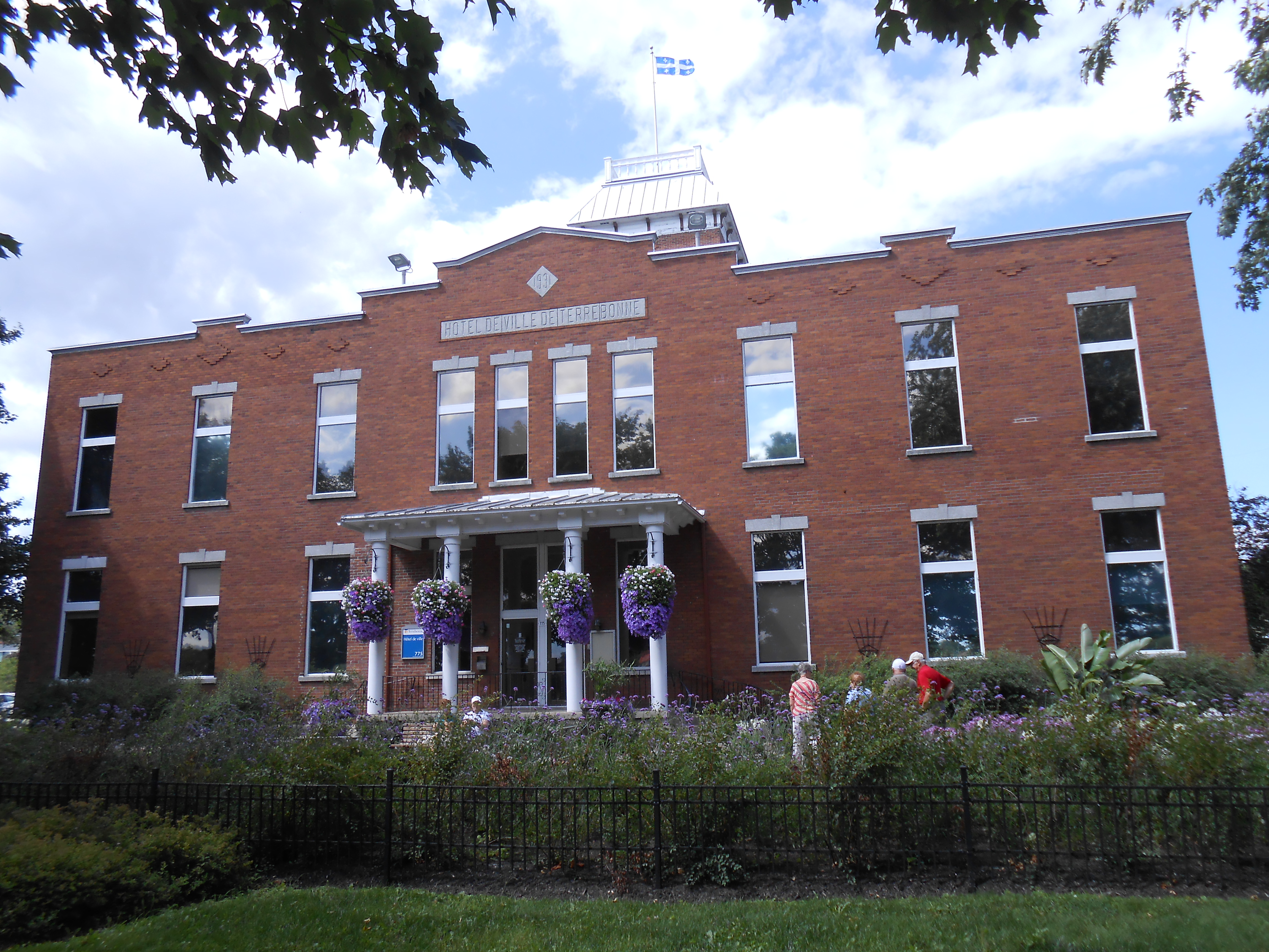 Hôtel de ville, 775, rue Saint-Jean-Baptiste, Terrebonne (Québec)